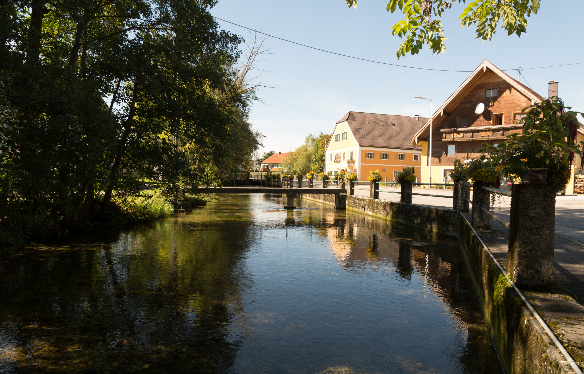 Schalchen, am Brunnbach - Oberösterreich